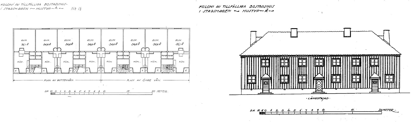 "Koloni av tillfälliga bostadshus i Stadshagen" plan och fasad, typritning